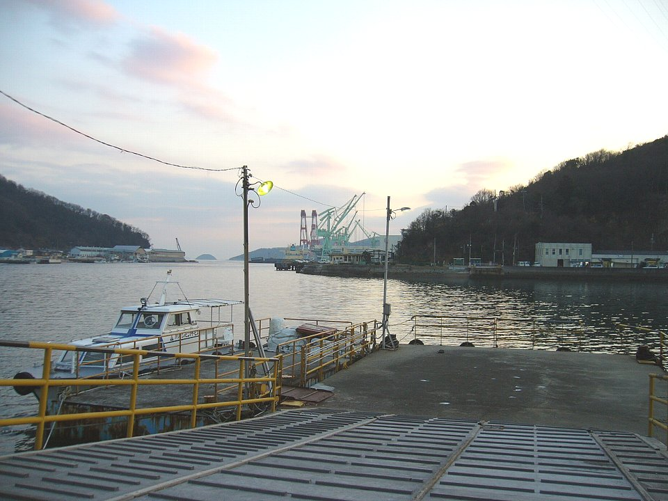 相生湾 皆勤橋北詰跡 左は坪根地区への渡船